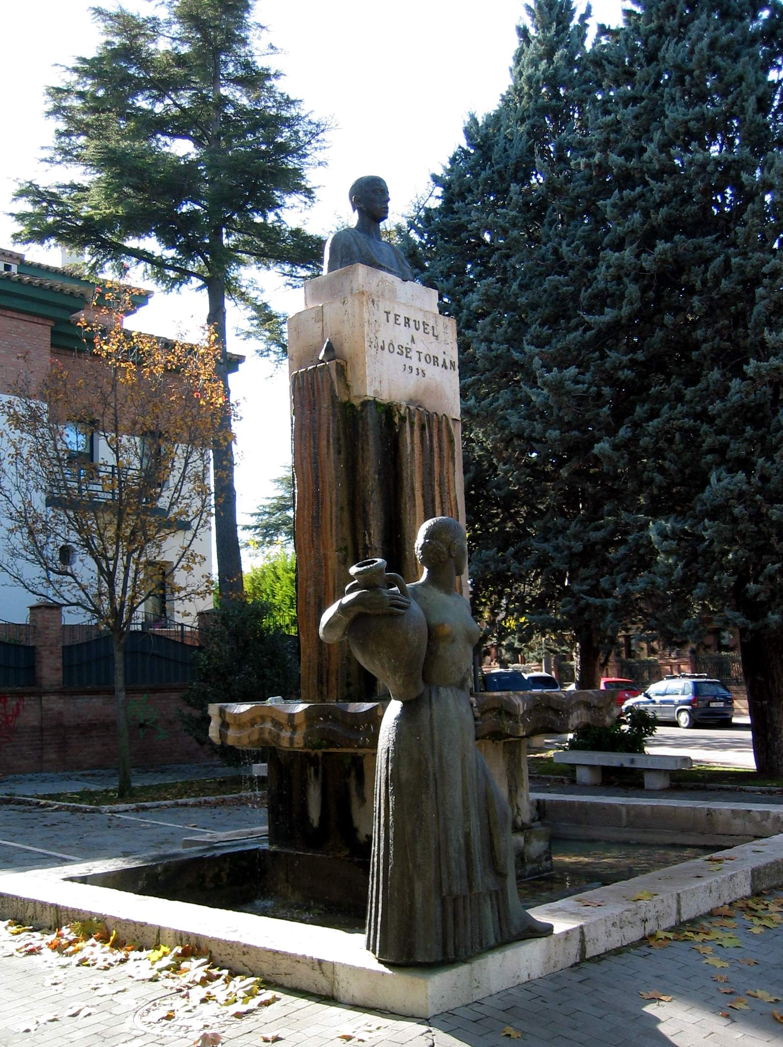 Vista general (lateral) del monumento erigido en memoria de José Torán de la Rad en Teruel (1935), obra del escultor palentino Victorio Macho, año 2016.